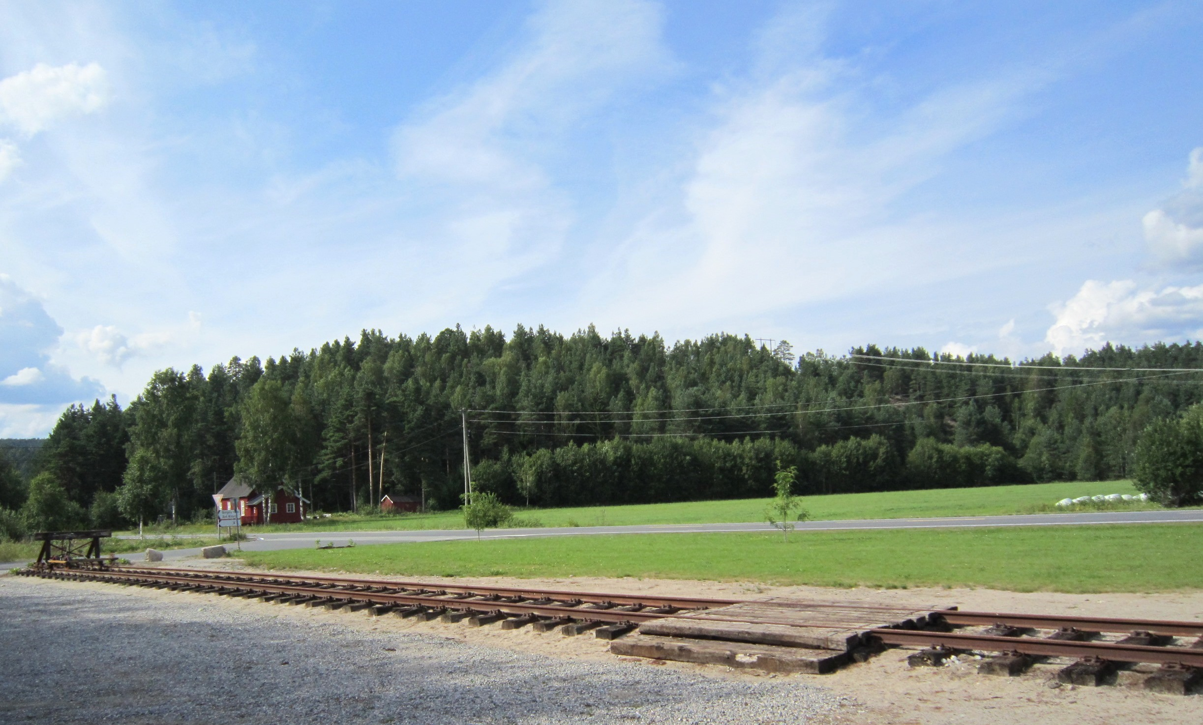 Fylkesvei 415 går forbi nedlagte Simonstad stasjon (Åmli kommune).